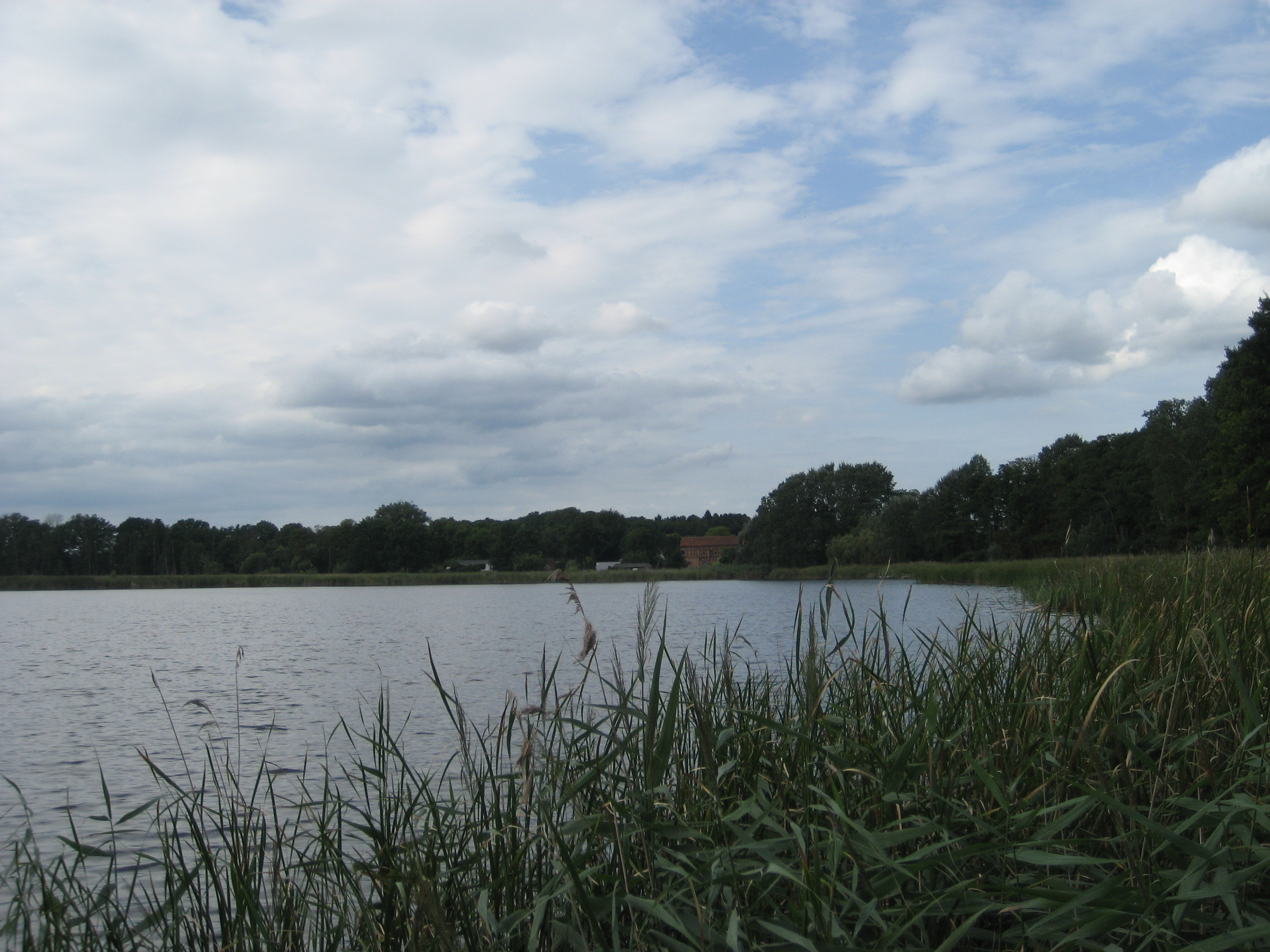 Kleiner Koblentzer See in Blick Richtung Norden.